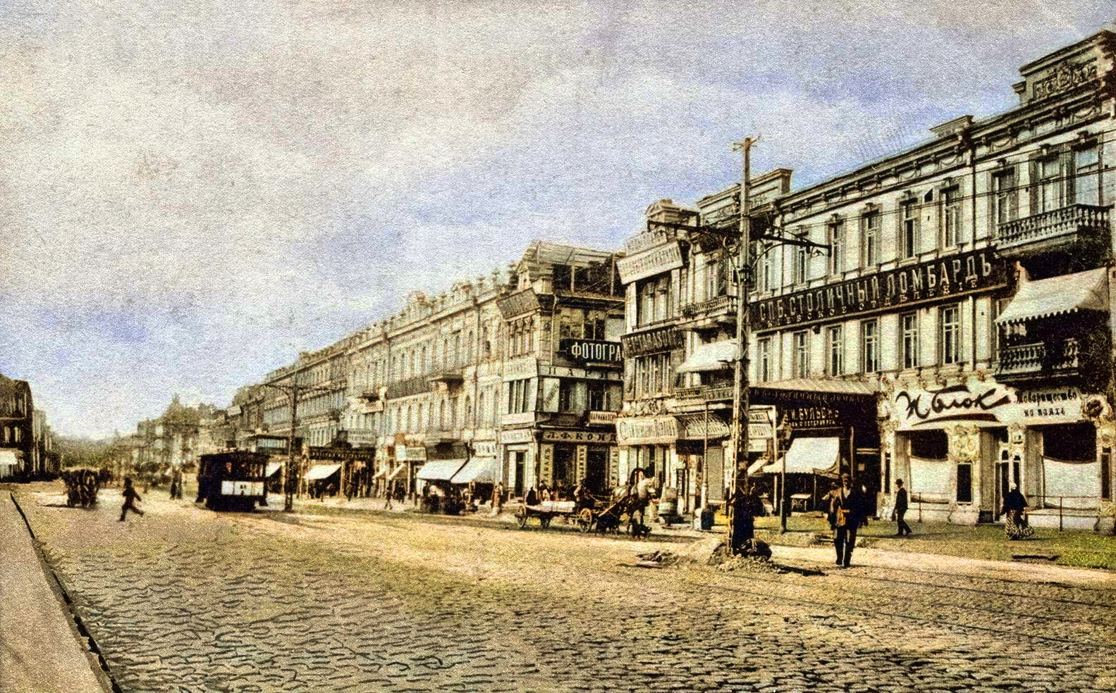 Будинок на Хрещатику (праворуч), Київ, вул. Хрещатик, 32